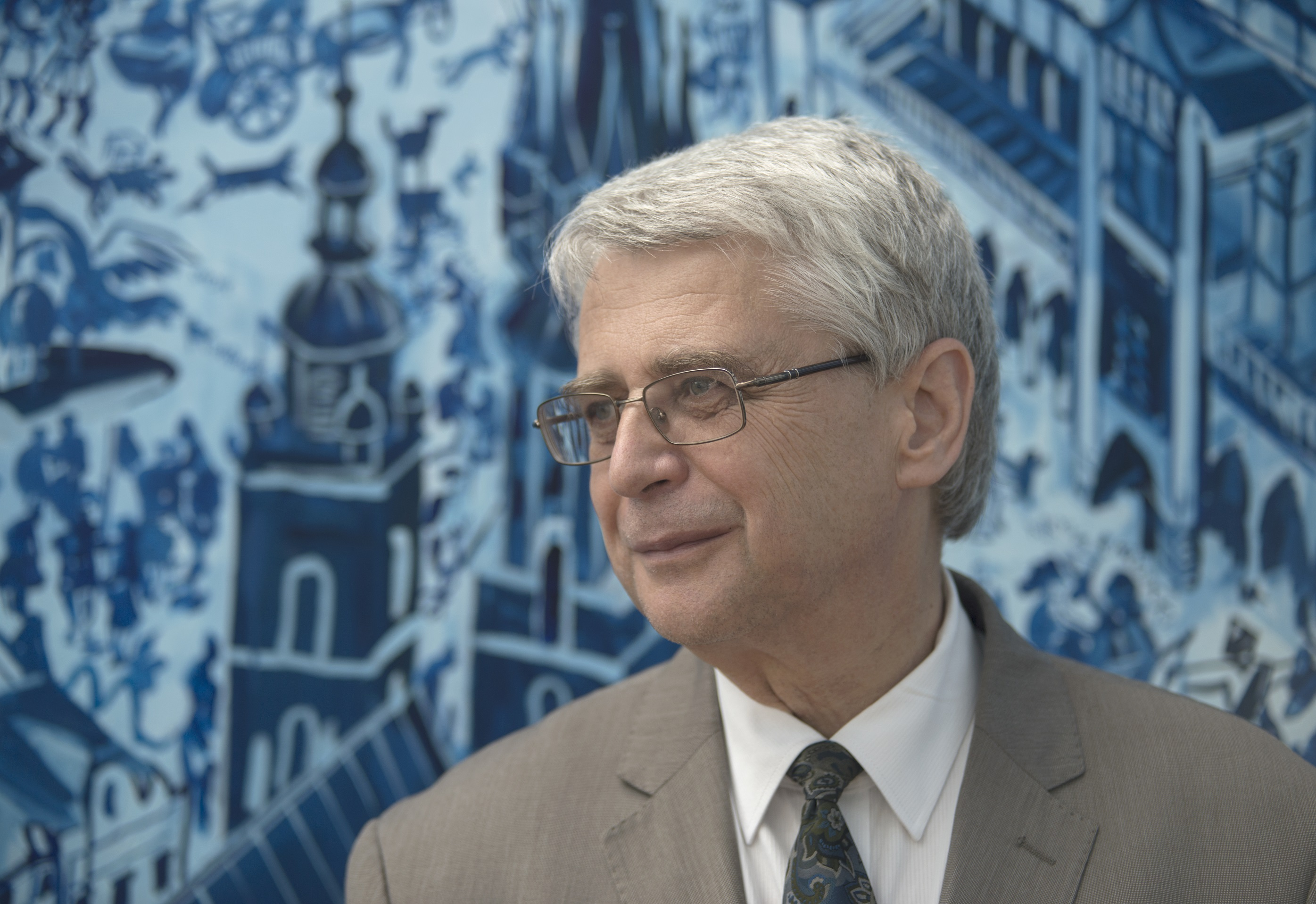 Profesor Jacek Purchla, historyk sztuki i ekonomista.